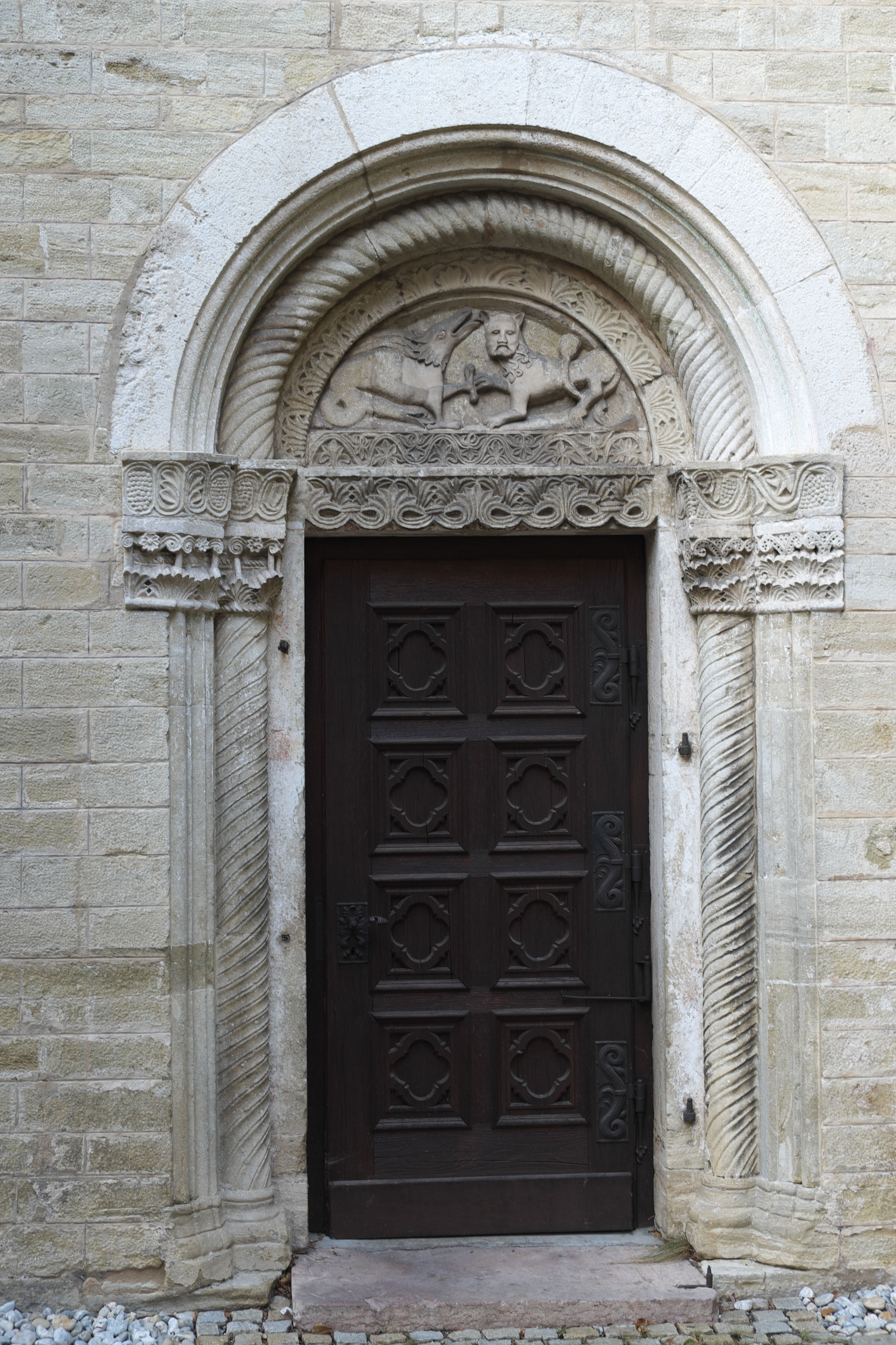 Alte katholische Pfarrkirche St. Peter in Straubing (Bayern/Deutschland), romanisches Südportal mit Tympanon